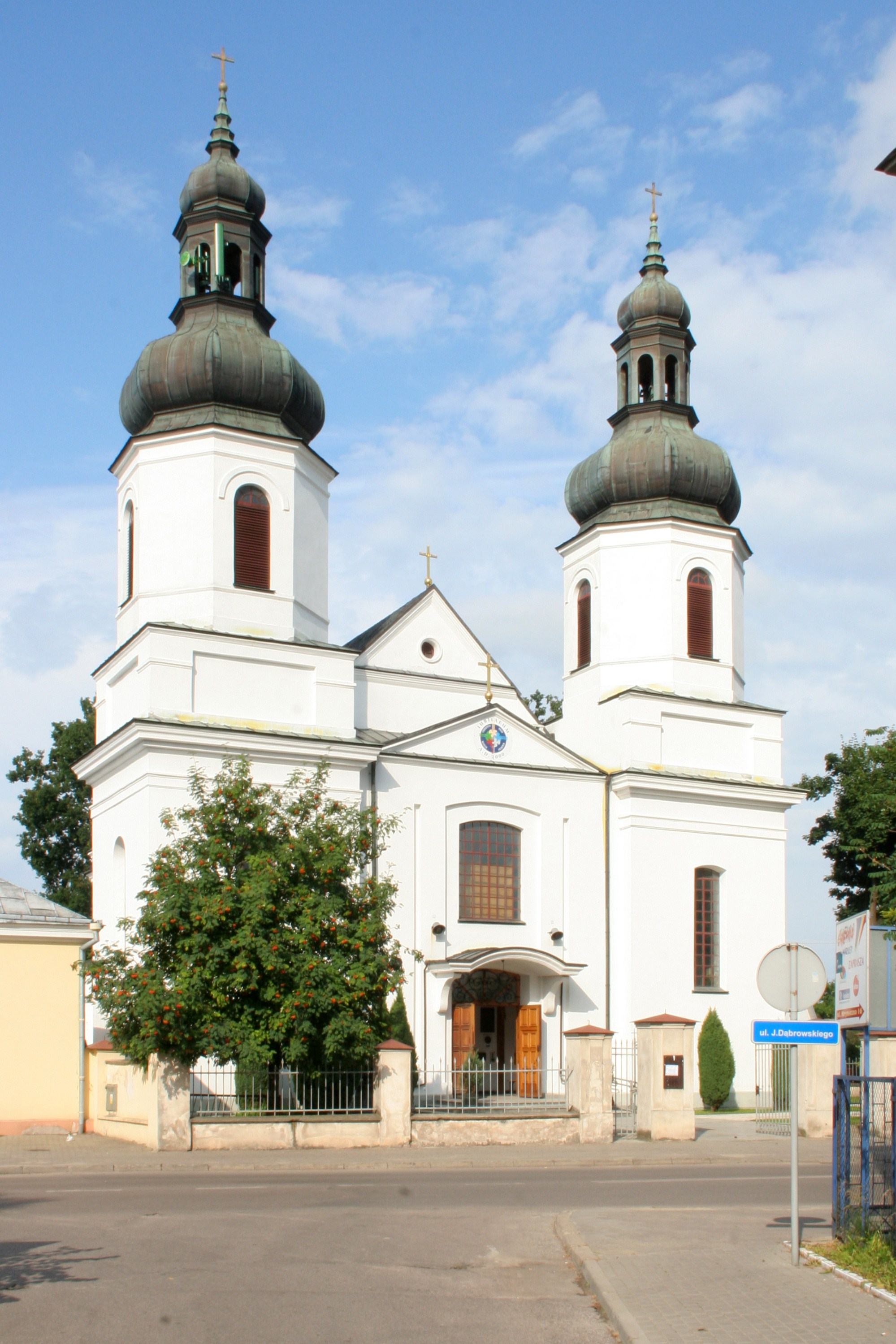 Kościół Matki Bozej z Góry Karmel w Bielsku Podlaskim.